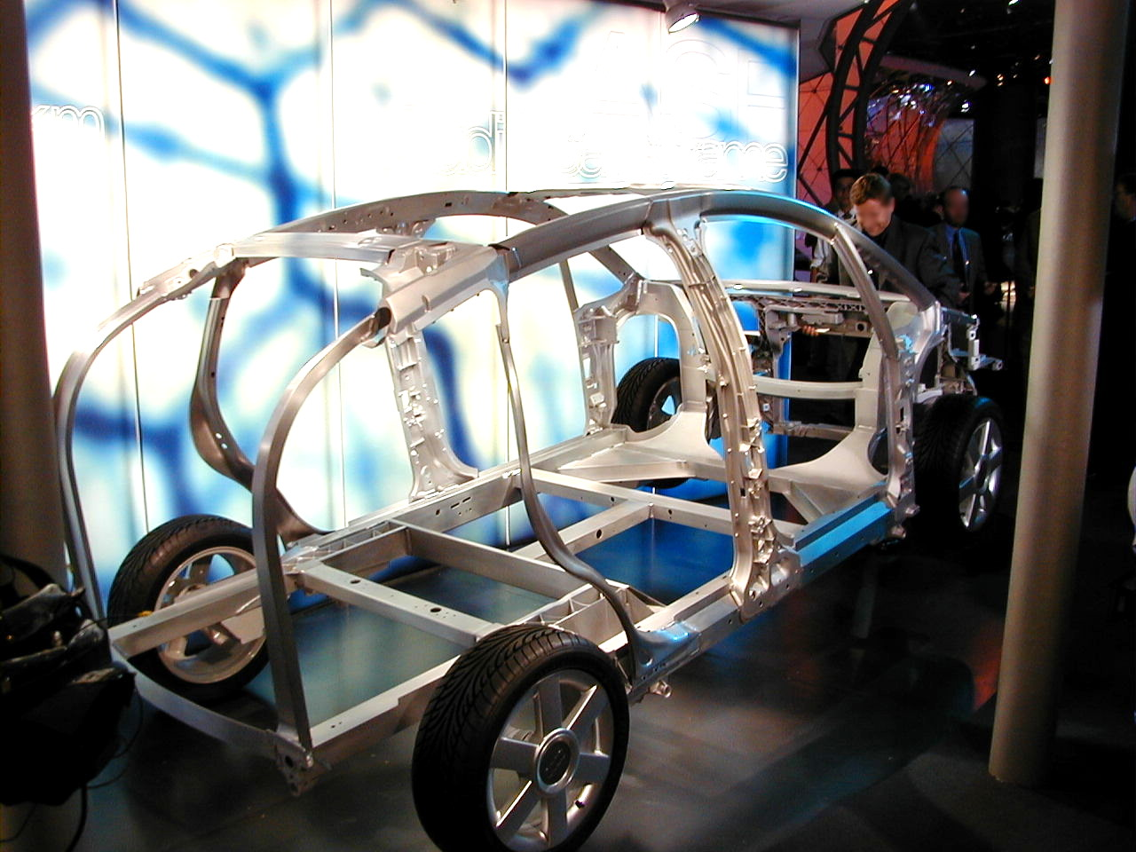 Audi A2 Space Frame Technik - erstmalig auf der IAA 1999 - dieser Alu-Gitterrohrrahmen ist sehr leicht.